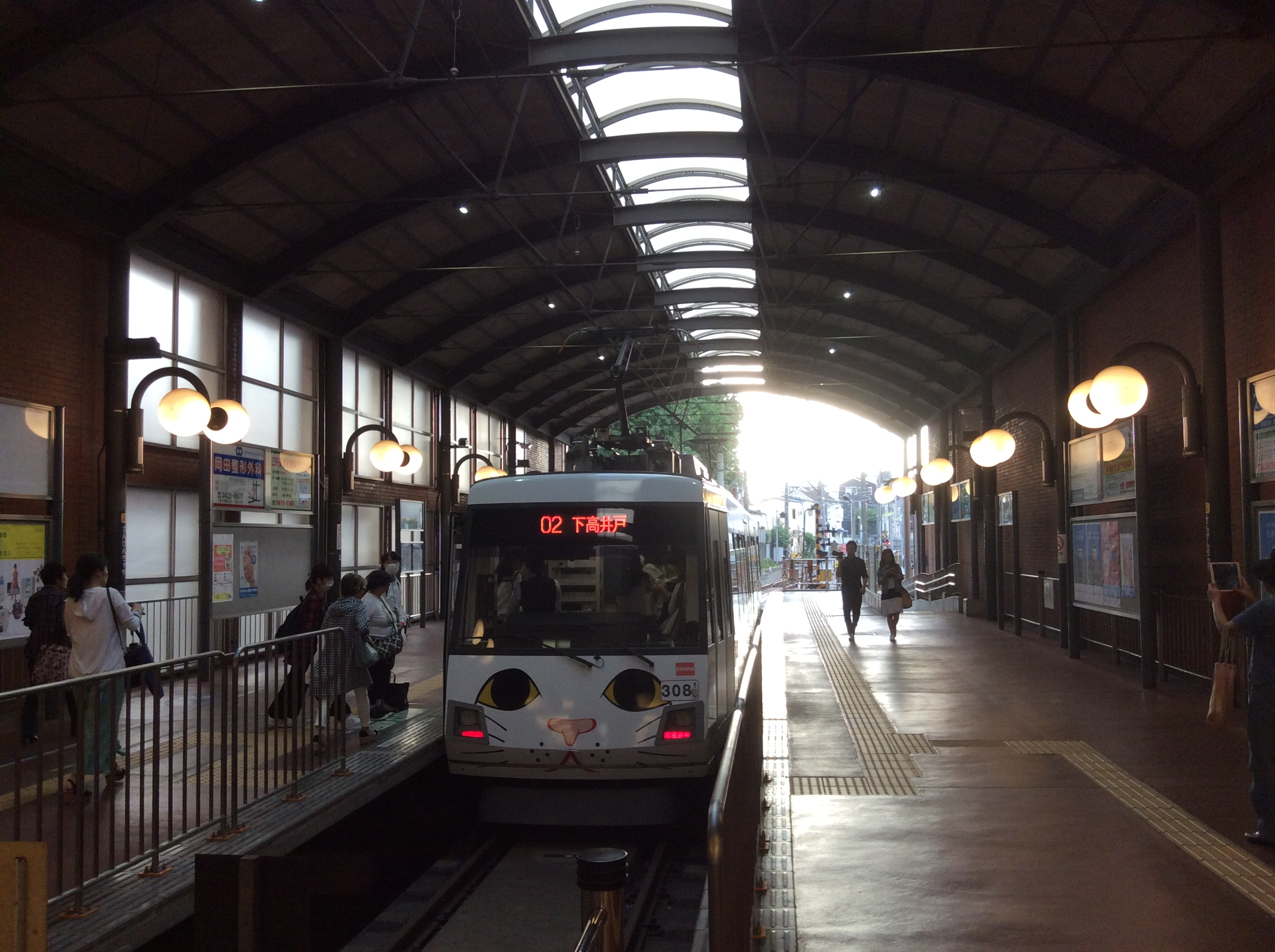 三軒茶屋駅